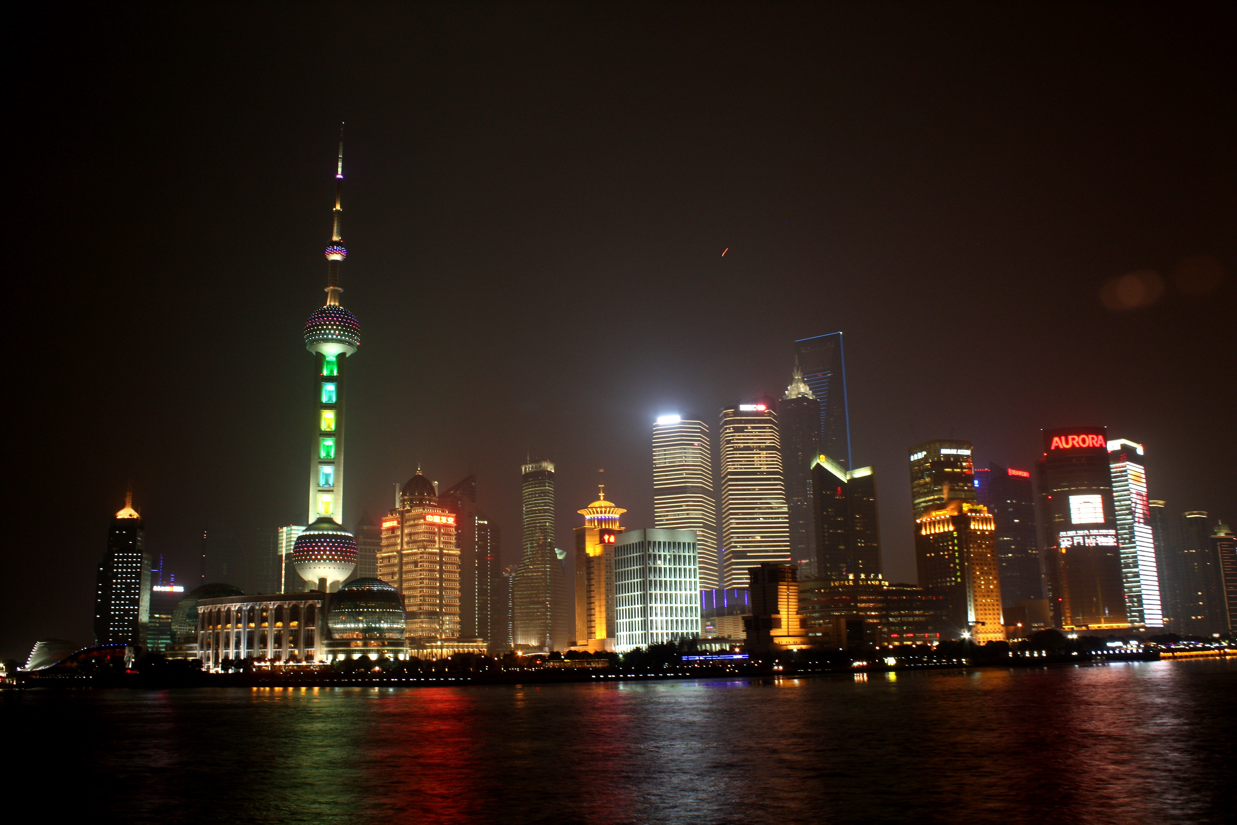 Nachtansicht von Pudong vom Bund aus